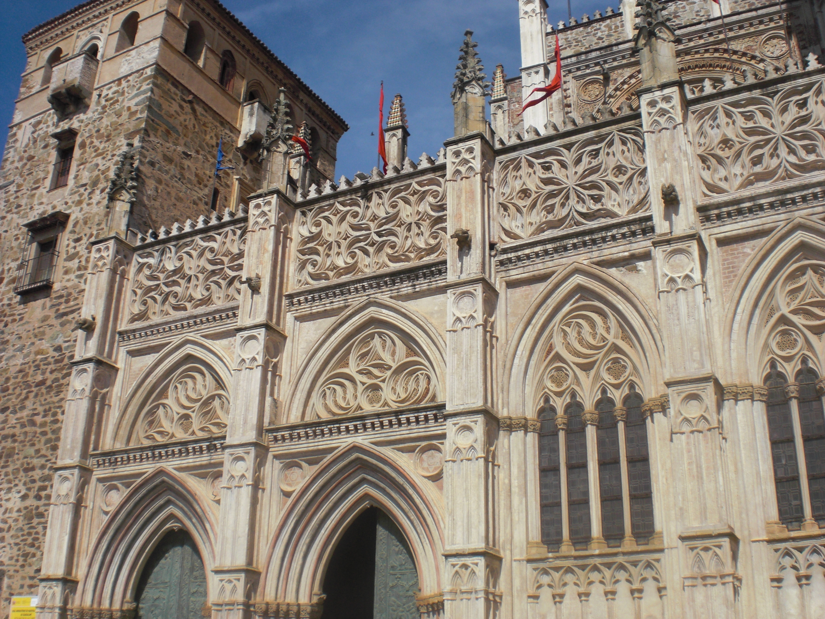 FasadodeGuadalupe